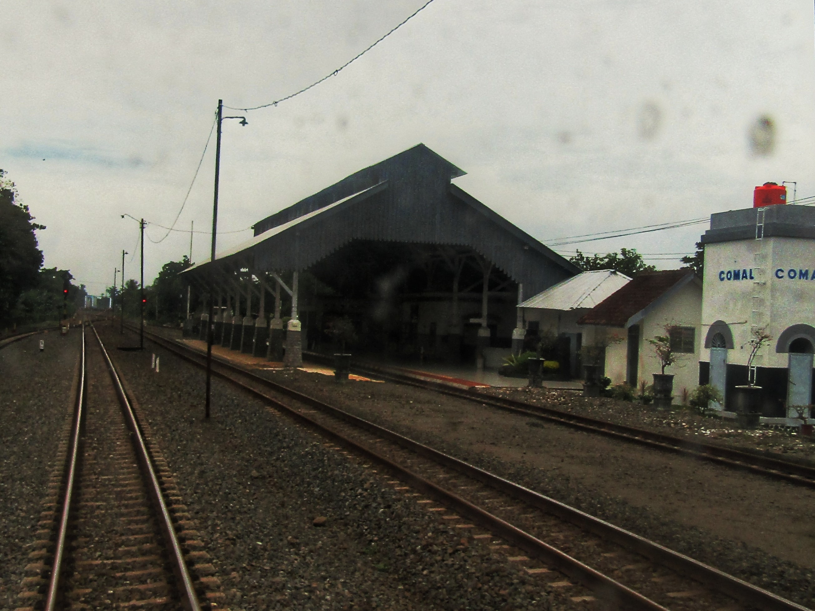 Tampak peron bangunan Stasiun Comal, 2019